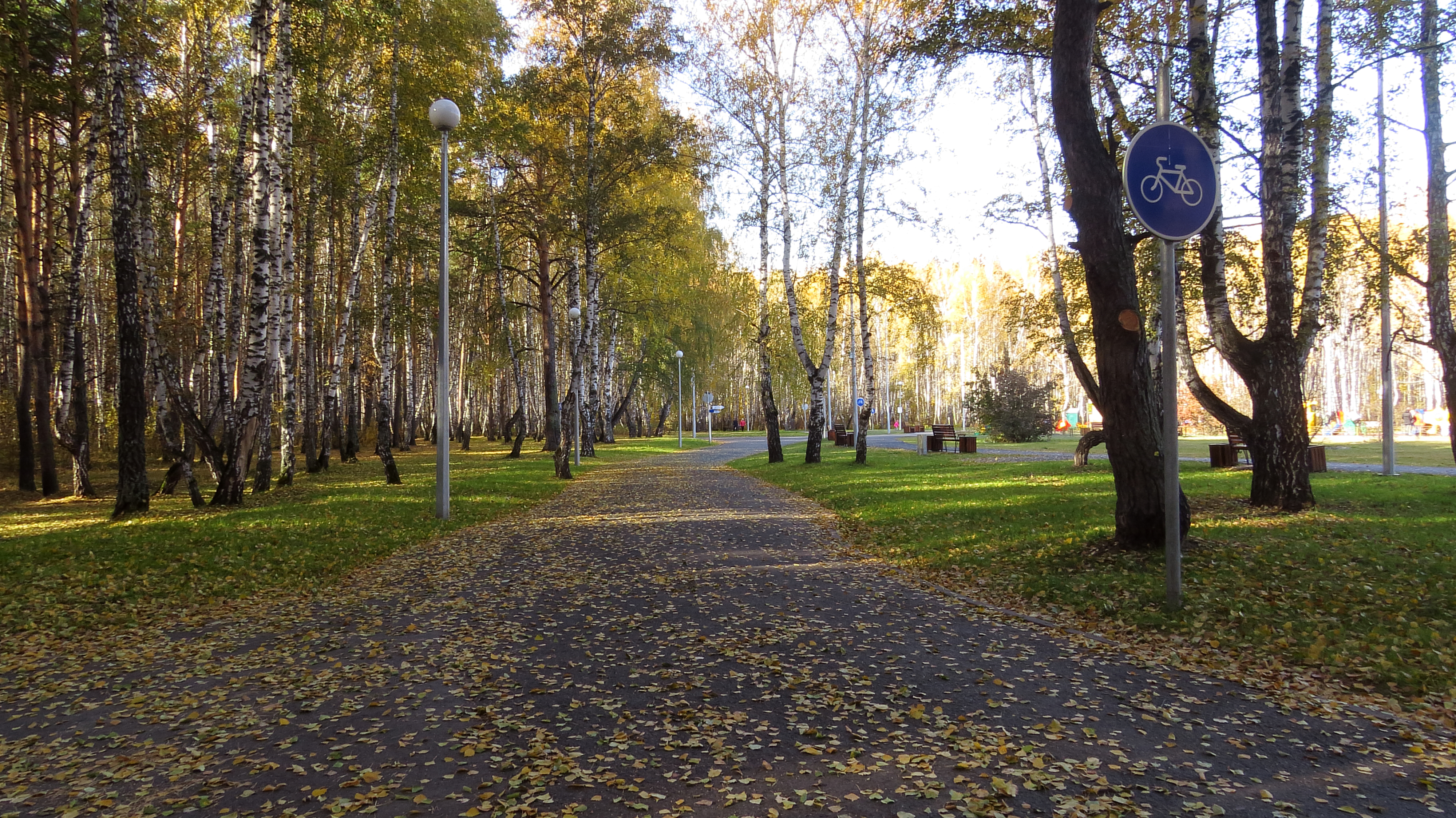 Гилевская роща: Тюмень, Тюменская область This image is related to the protected area of Russia number 7230137